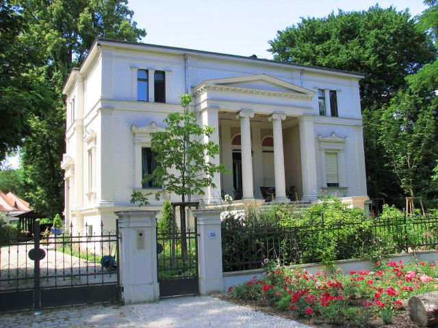 Die Stülpnagel-Villa Am Neuen Garten in Potsdam beherbergte die Kommandozentrale des KGB. Die spätklasszistische Villa wurde 1874–1875 errichtet und wechselte mehrfach den Besitzer.